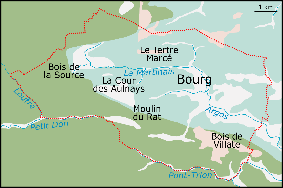 français (fr): Carte géologique de la commune de Challain-la-Potherie, Maine-et-Loire, France. Légende Schistes, poudingues et siltites du Briovérien Schistes, grès et siltites de l'Areginien Sables, calloutis et graviers du Pliocène ; alluvions modernes Altérites suposées paléogènes